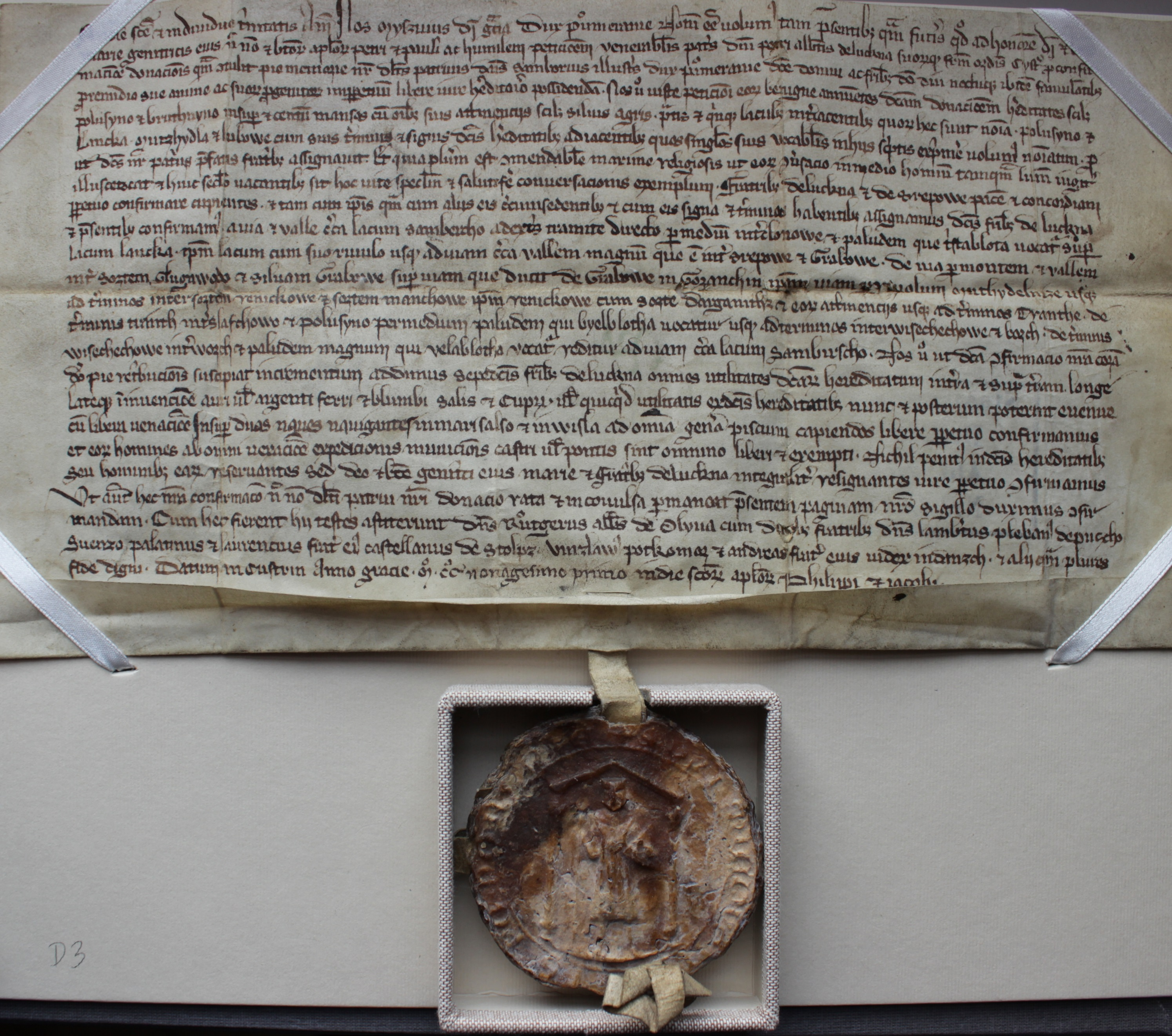 Mściwoj (Mszczuj) II, książę Pomorza Gdańskiego, na prośbę Piotra, opata i braci konwentu cysterskiego w Łeknie, zatwierdza temu klasztorowi darowizny swego stryja, Sambora, księcia pomorskiego, tj. wsi Polusino [Połęczyn] i Brutnino na Pomorzu Gdańskim, wolnych od ciężarów oraz 100 włók z przyległościami, które opisuje. Do dokumentu przywieszona pieczęć.